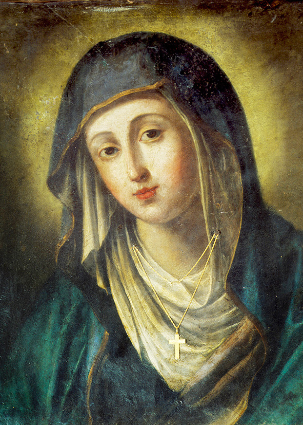 Peinture de Santa Maria Causa Nostrae Letitiae de Domenico Maria Muratori, 1696, Église Madonna dell'Archetto – Rome